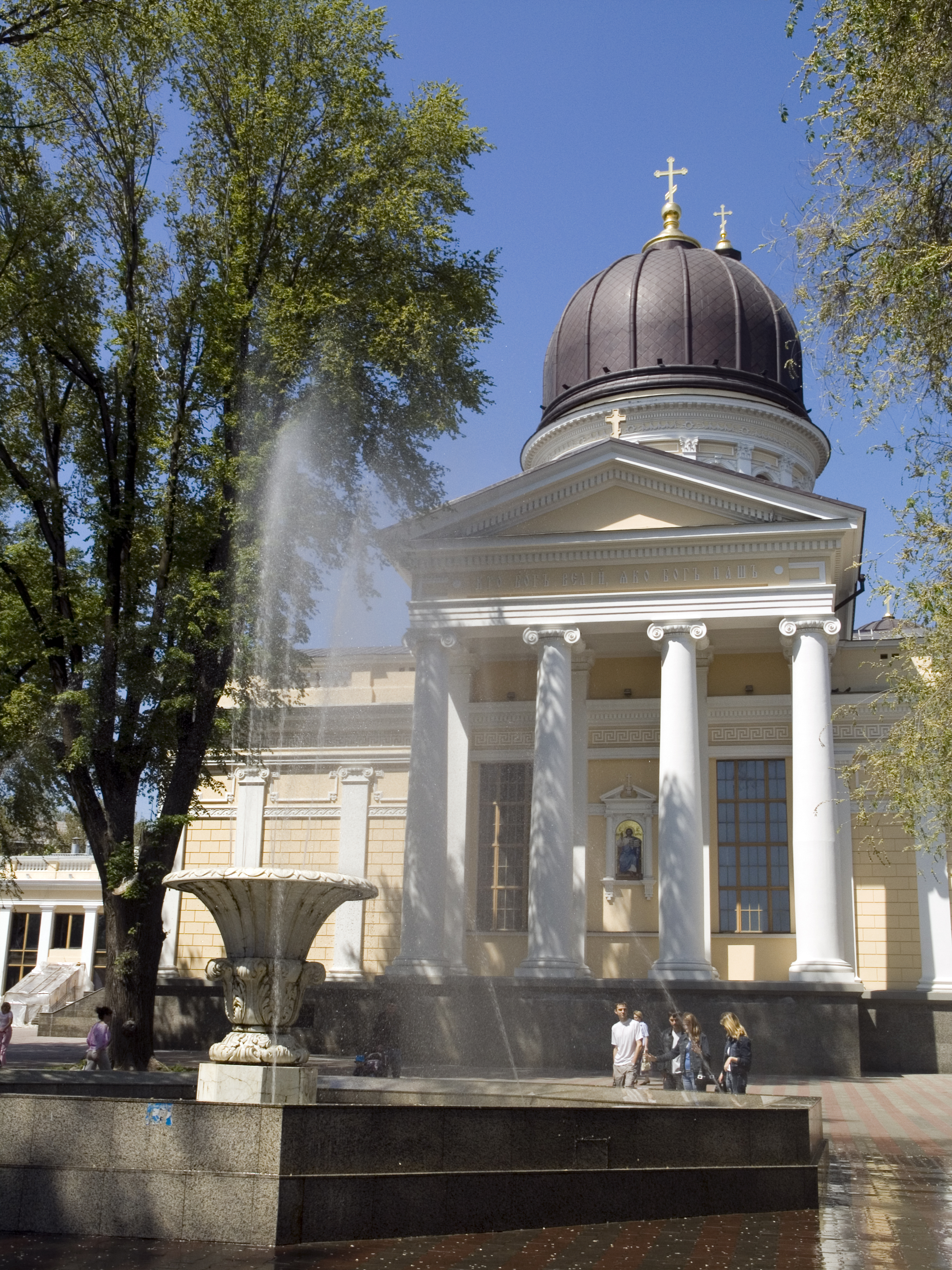 Україна, Одеса - Будівля Спасо-Преображенського собору, де поховано видатних людей м. Одеси й Південного регіону України – князя М.С. Воронцова та княгиню Є.К. Воронцову